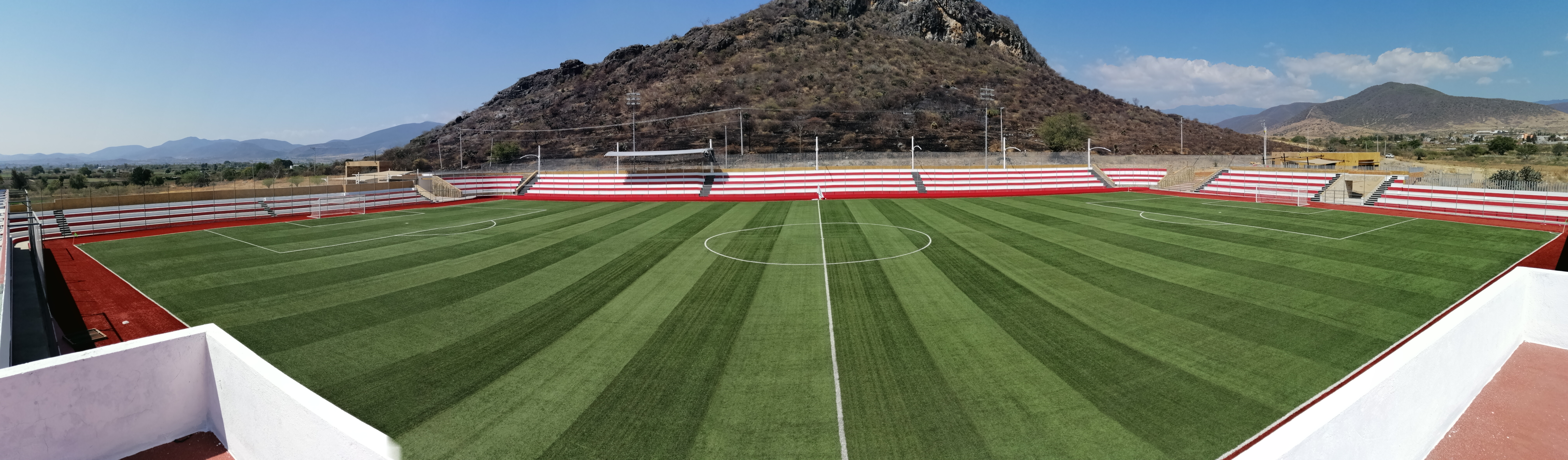 Estadio Independiente MRCI panoramica centrada